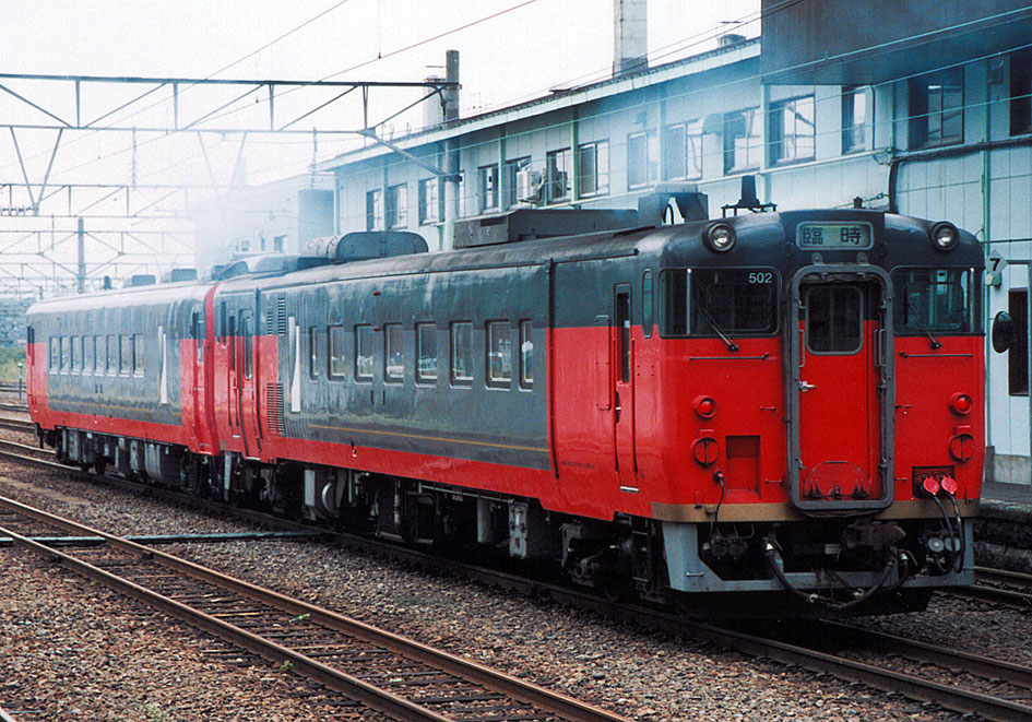 JR北海道 キハ400-502+キロ59 1？「くつろぎ」